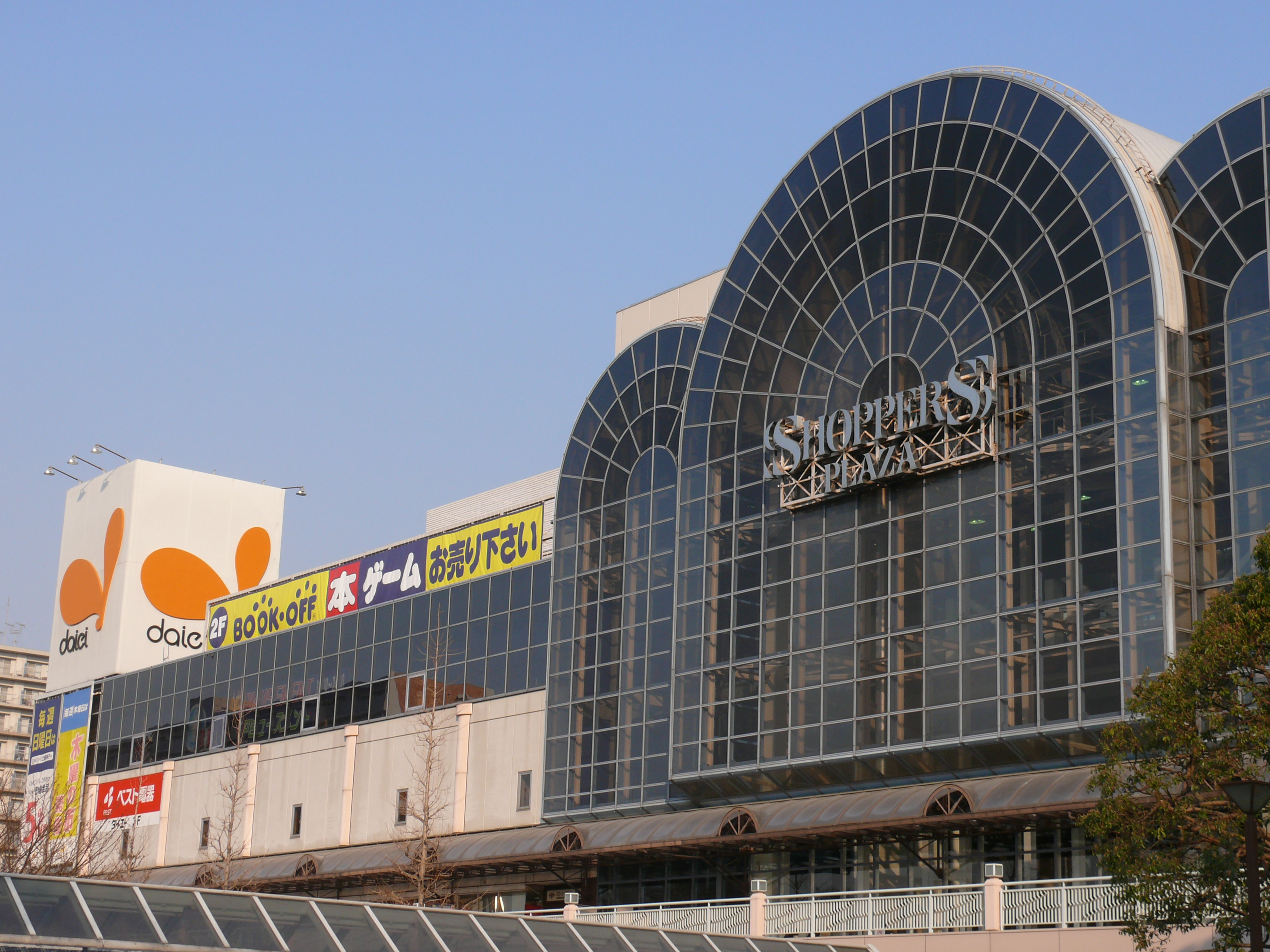 ダイエー新浦安